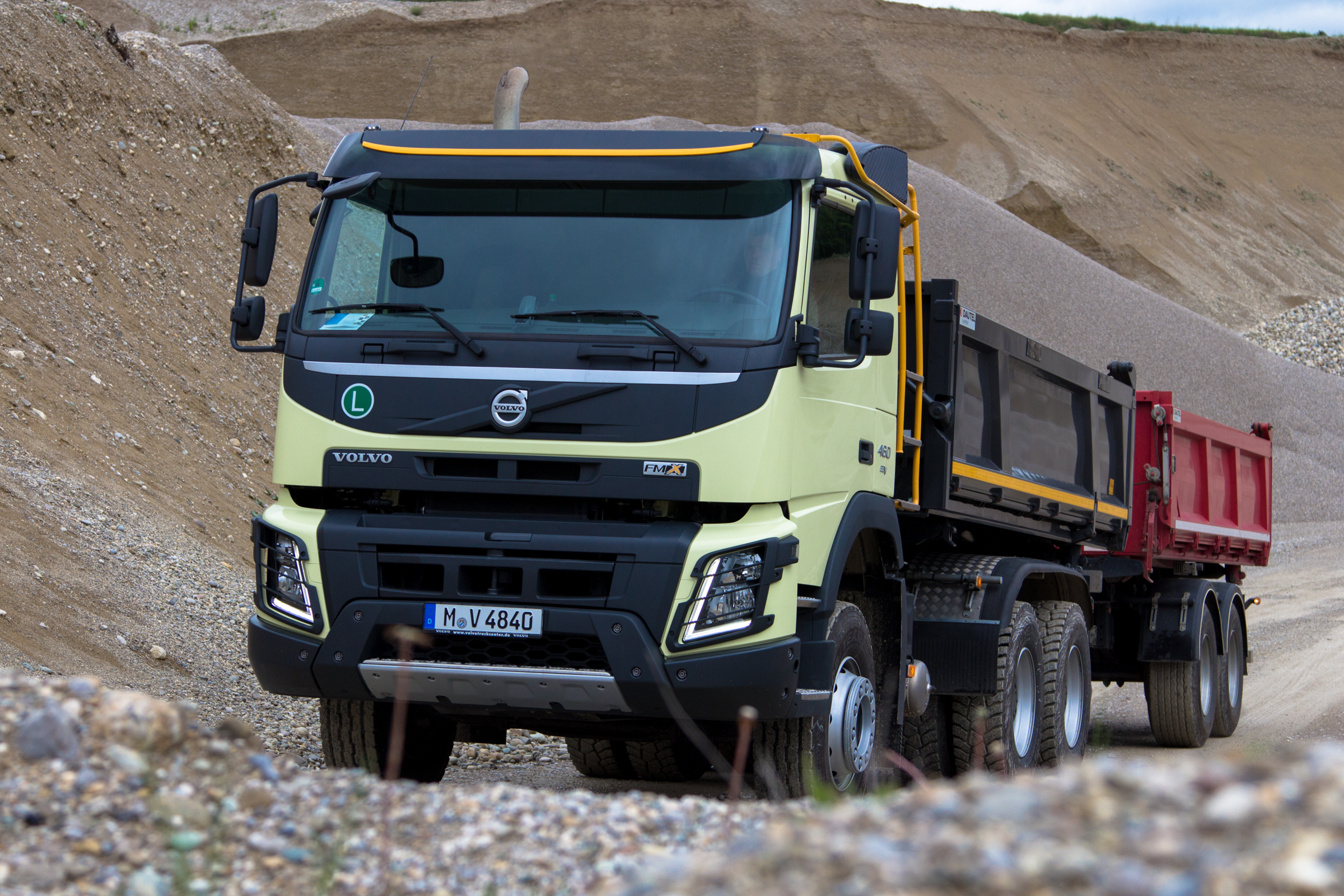 Baureihe FMX von Volvo Trucks